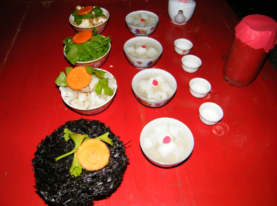 天公生祭拜